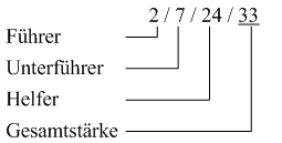 Die Darstellung der Personalstärke einer Einsatzeinheit mit Erläuterung der Zahlengruppenbedeutung. (Die Einsatzeinheit hat eine stärke von 2 Zugführer, 7 Unterführer, 24 Helfer so das man eine gesamtstärke von 33 hat)